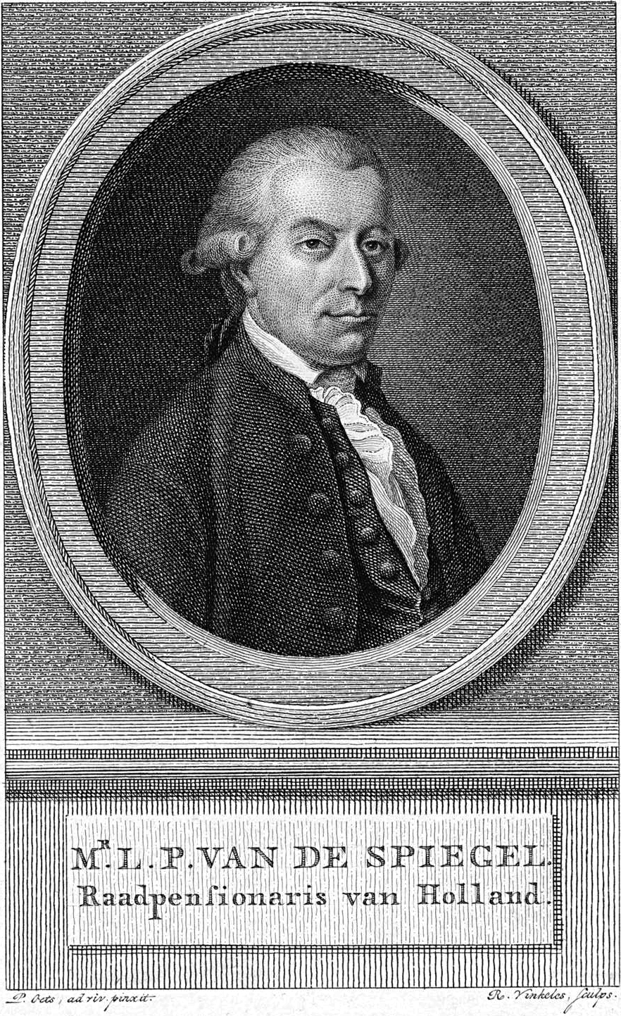 Portrait of Laurens Pieter van de Spiegel (1736-1800), Dutch politician